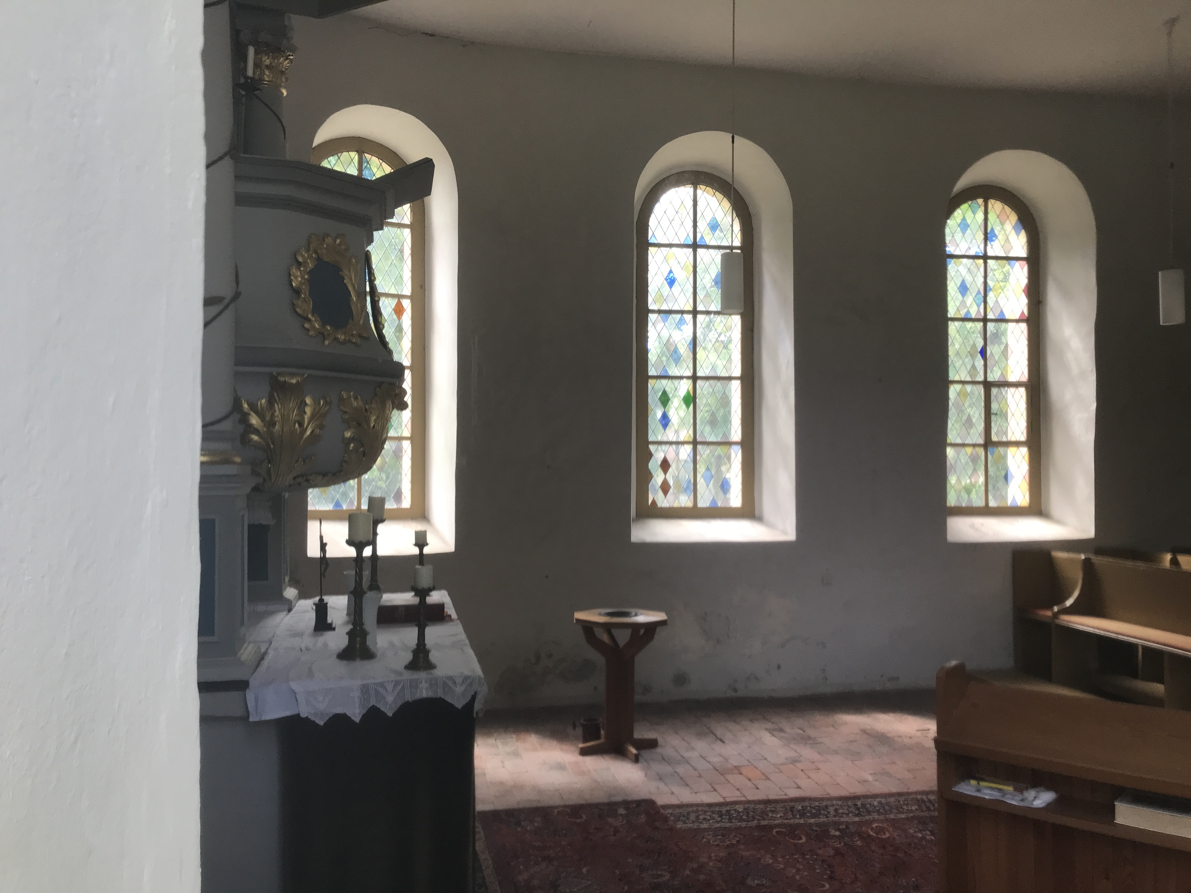 Die Dorfkirche Wachow ist eine im Kern spätgotische Saalkirche in Wachow, einem Ortsteil der Stadt Nauen im Landkreis Havelland in Brandenburg. Im Innern steht unter anderem ein Kanzelaltar aus der Zeit um 1730.